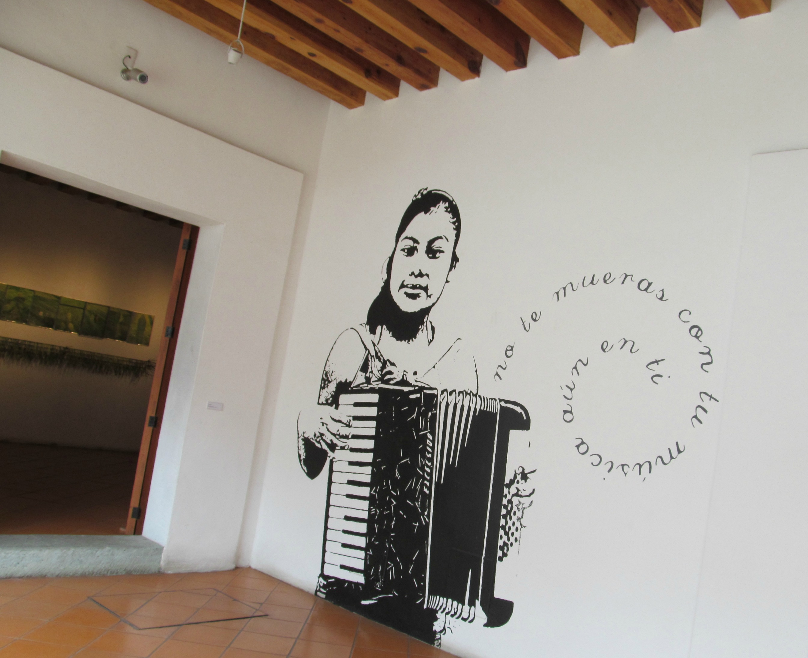 Mural de niña Indígena.